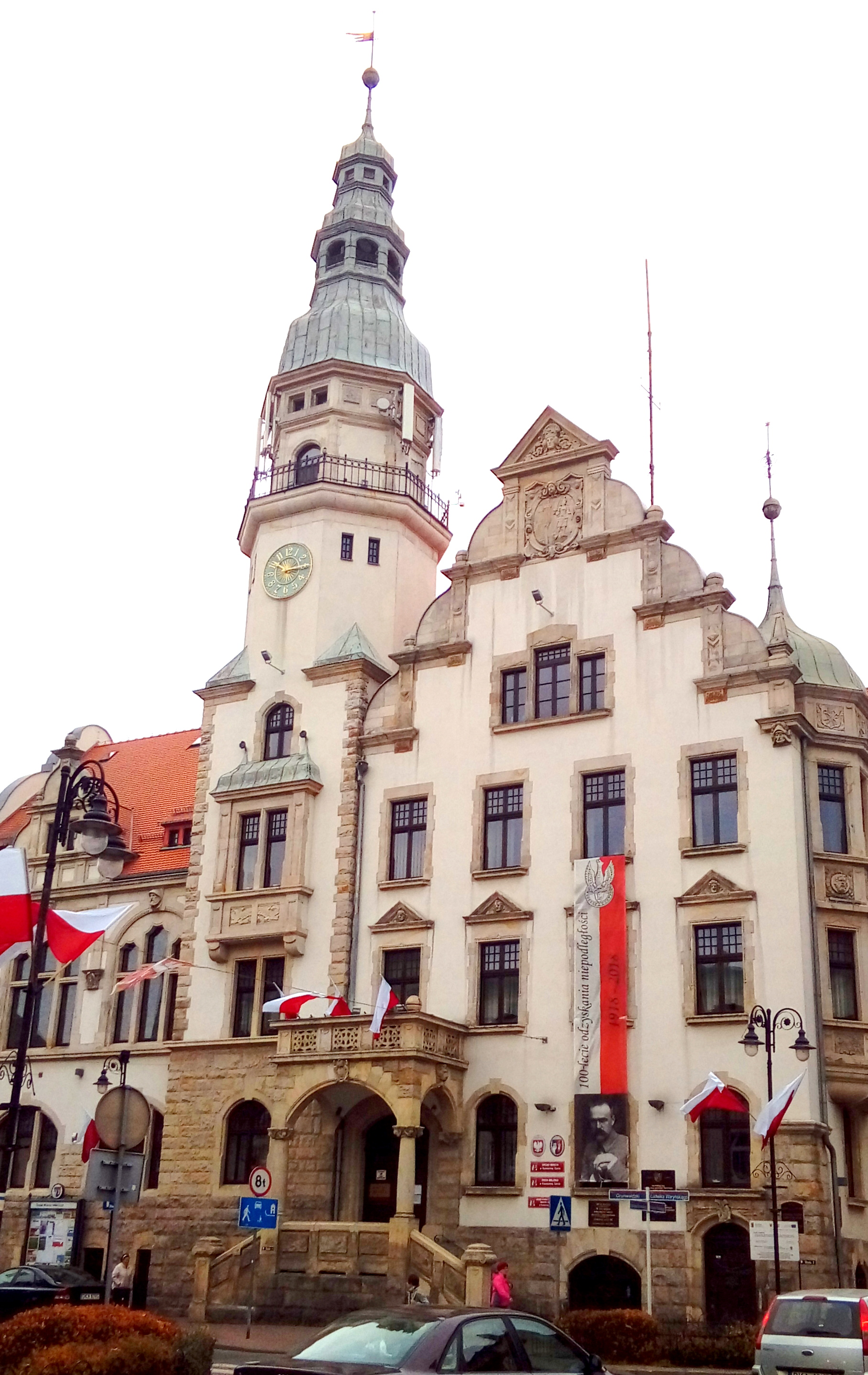 Ratusz w Kamiennej Górze